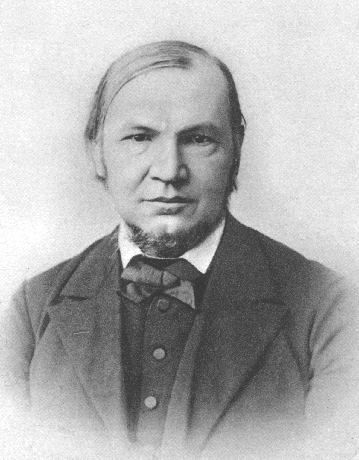 Friedrich von Bodelschwingh der Ältere (1831–1910), evangelischer Pfarrer, Theologe, Gründer und Leiter der Anstalt Bethel (Bielefeld) - Foto aus jüngeren Jahren